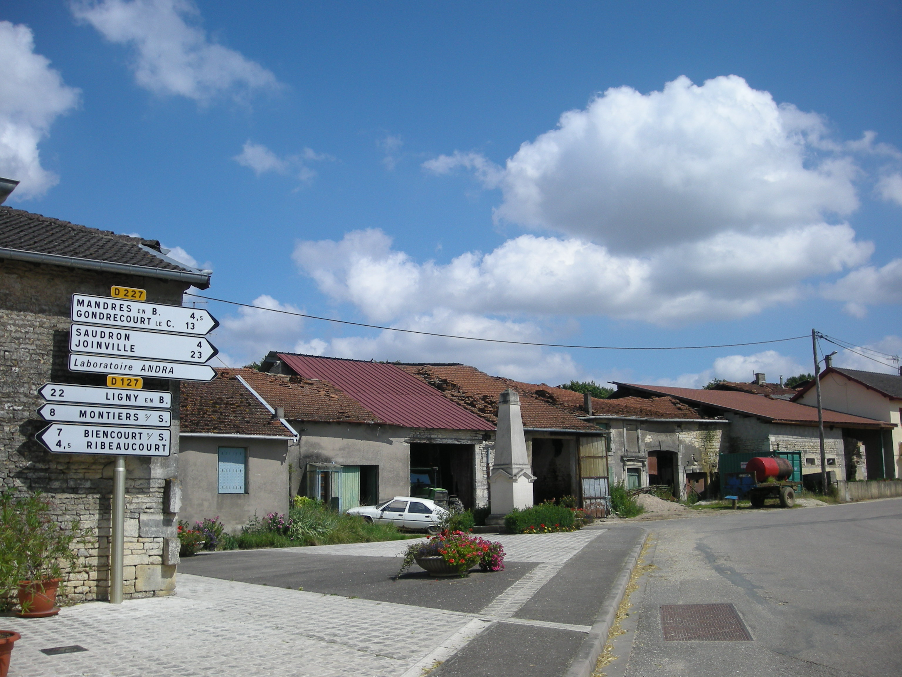 Monument aux morts de Bure (Meuse)